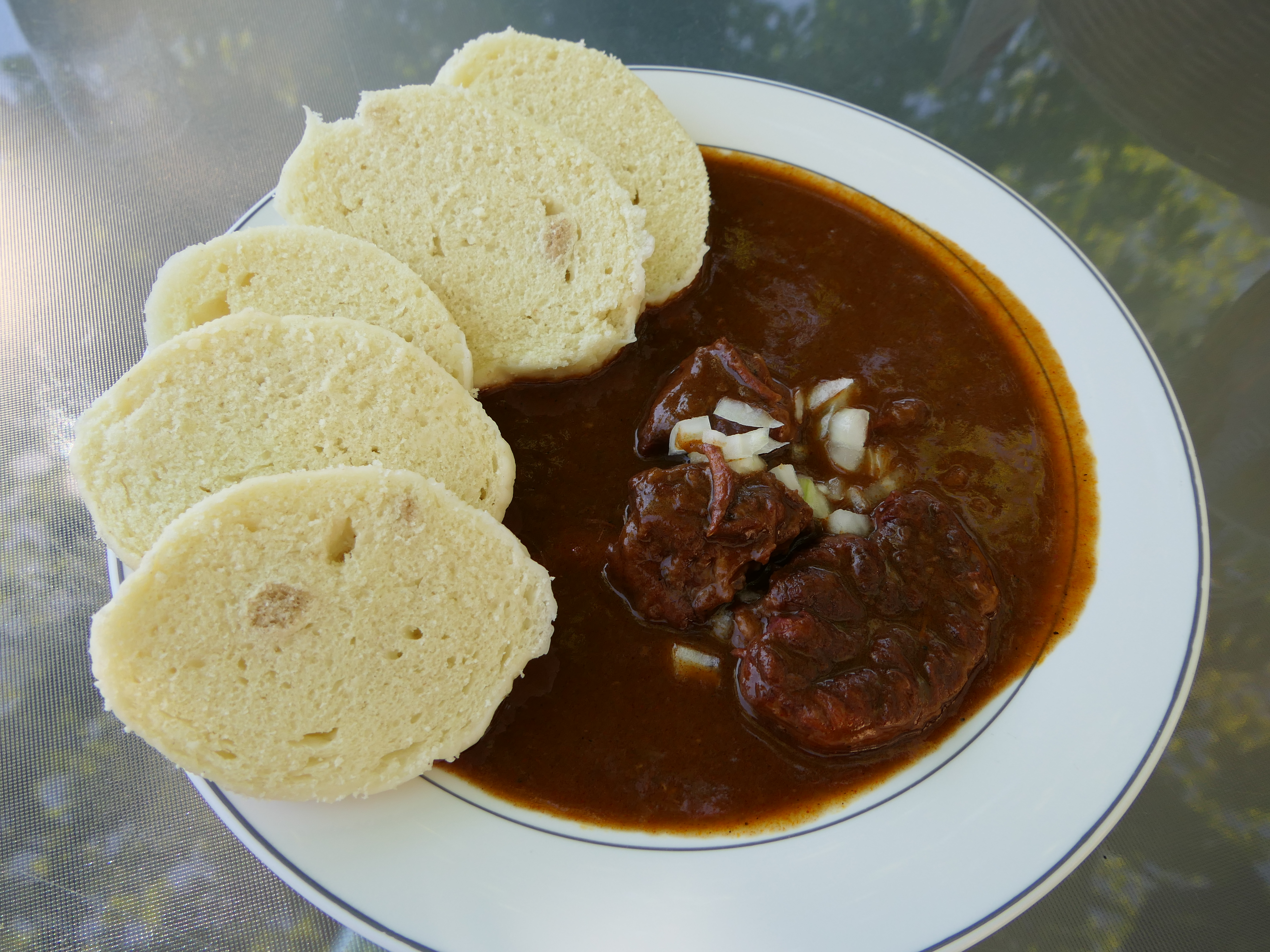 Rindergulasch_mit_Hefeknödeln (Burg Schreckenstein, Ústí nad Labem, Tschechien)